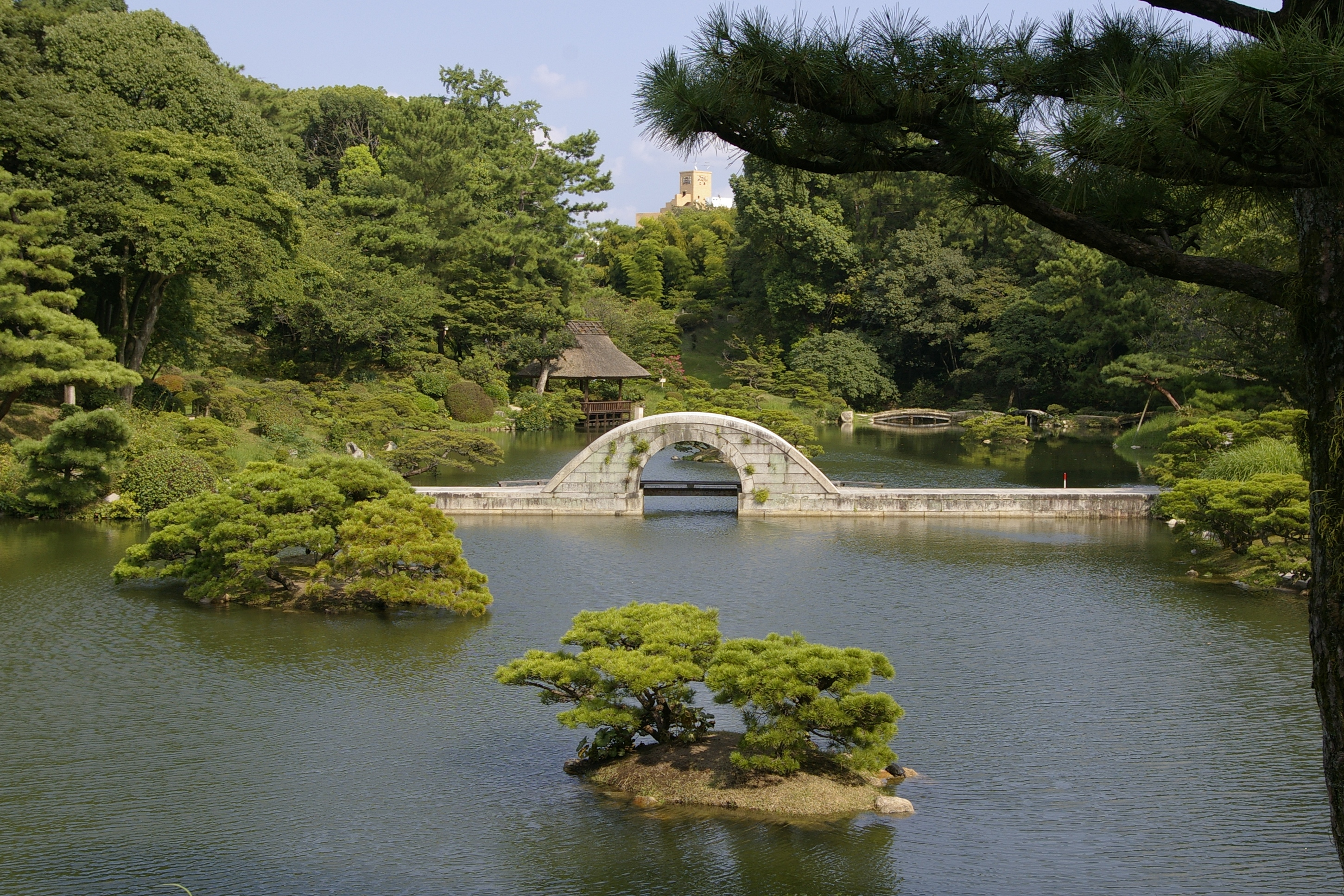 Koko-kyo im Shukkei-en